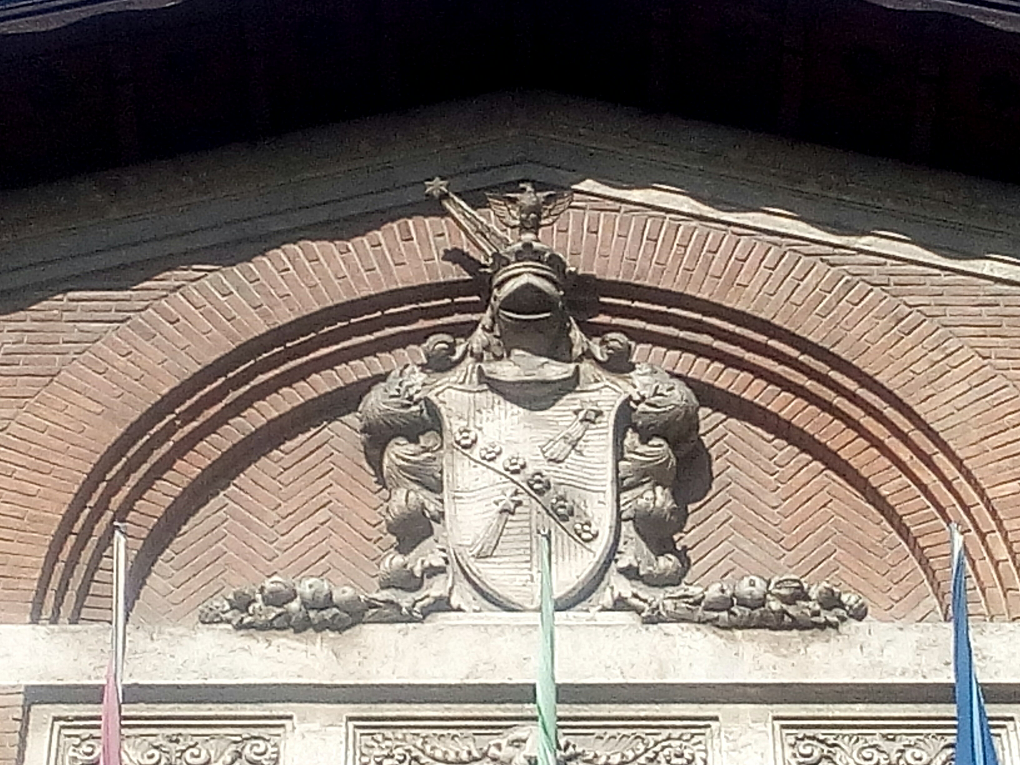 Stemma coloccato sul balcone del palazzo Torlonia di Avezzano